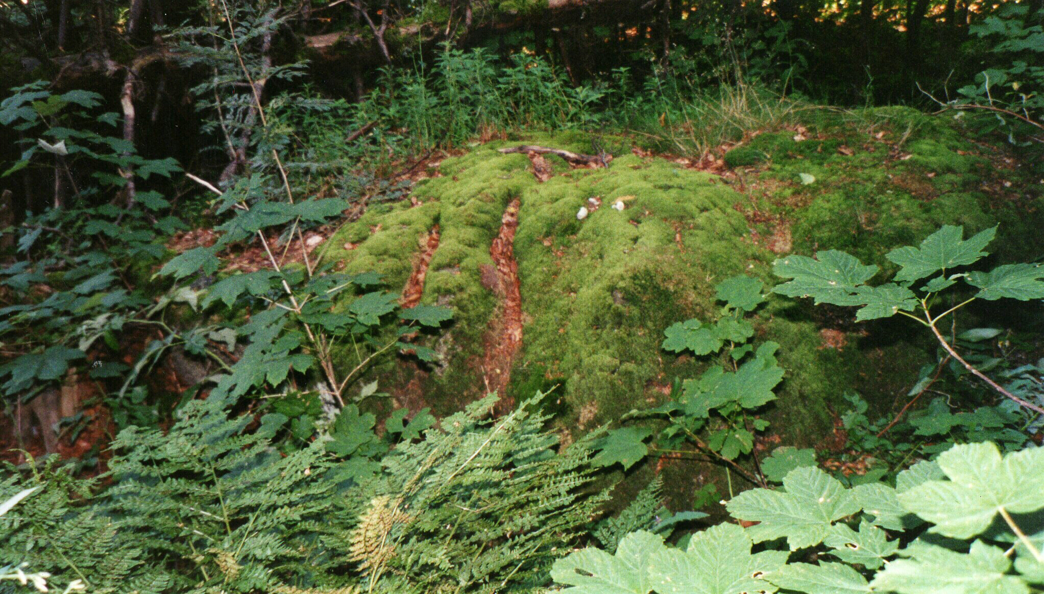 Angeblicher Opferstein der Theorie der Wendischen Wallstätte von Ludwig Zapf über den Waldstein